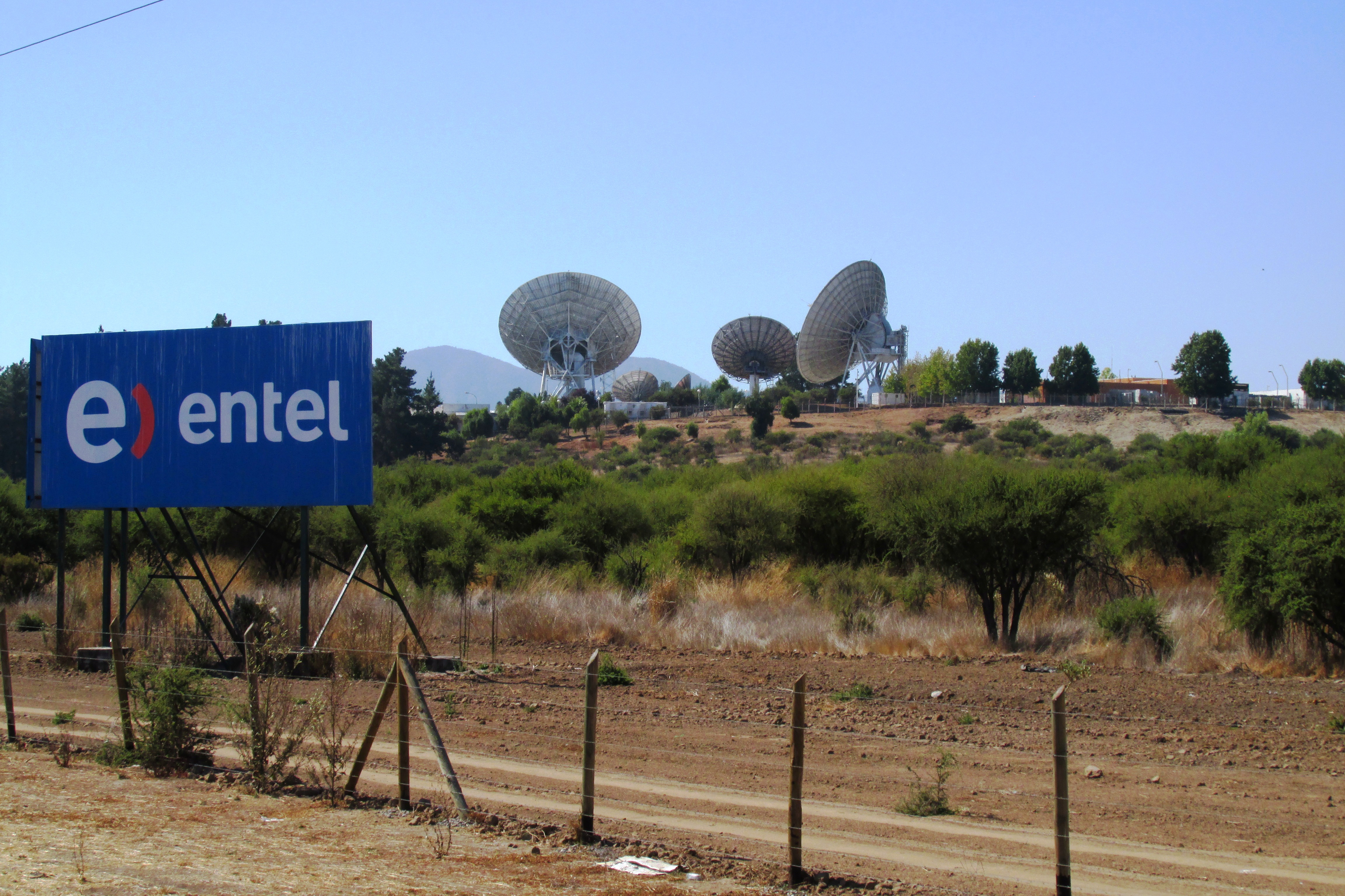 Vista exterior Estación Terrena Longovilo Entel comuna San Pedro Región Metropolitana